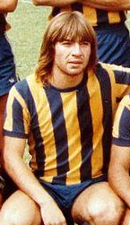 Wálter Maladot